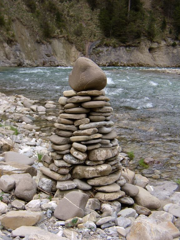 Steinmanderl an der Ammer (Nähe Schleierfälle)